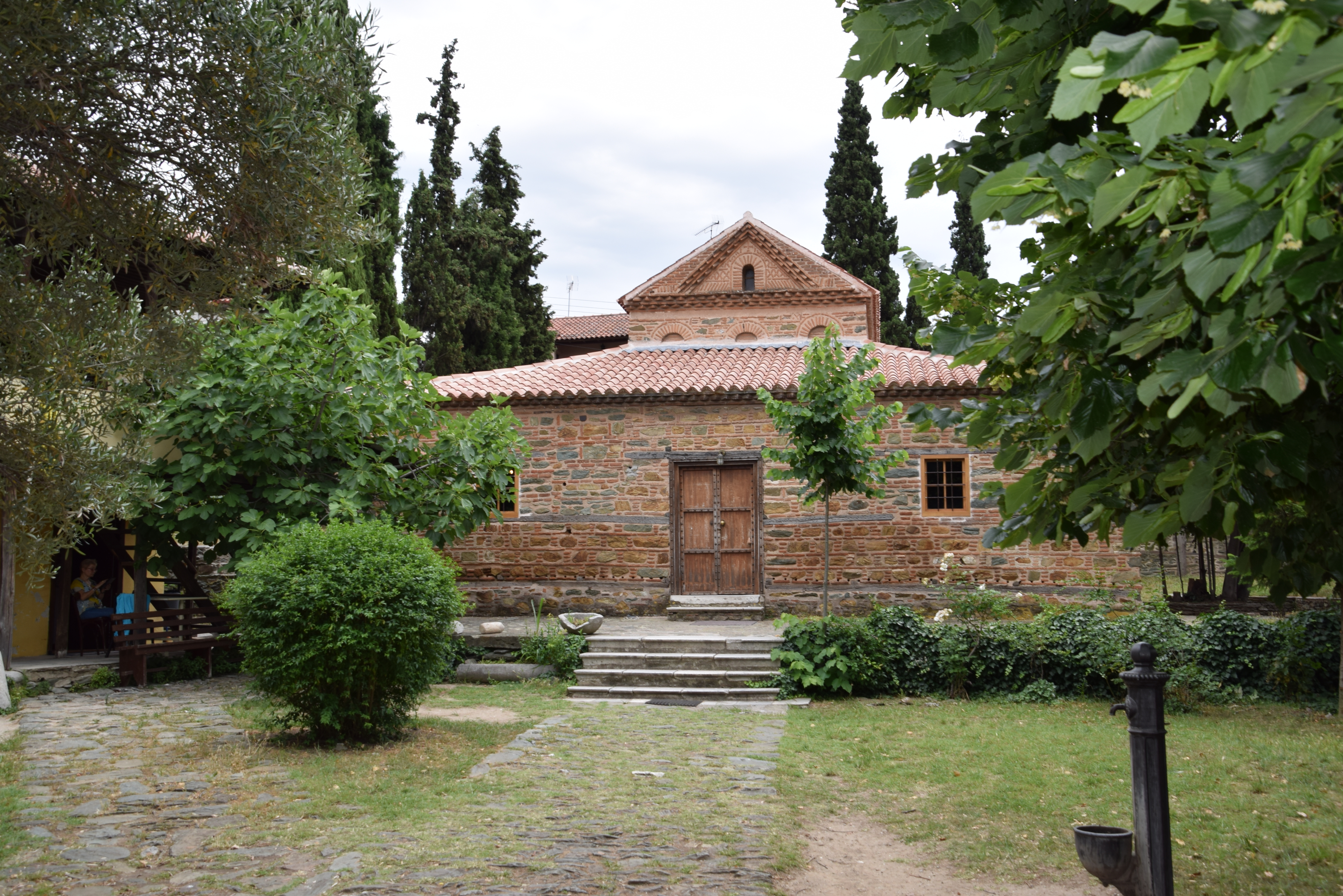 Agios Nikolaos Orfanos